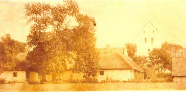 Photo